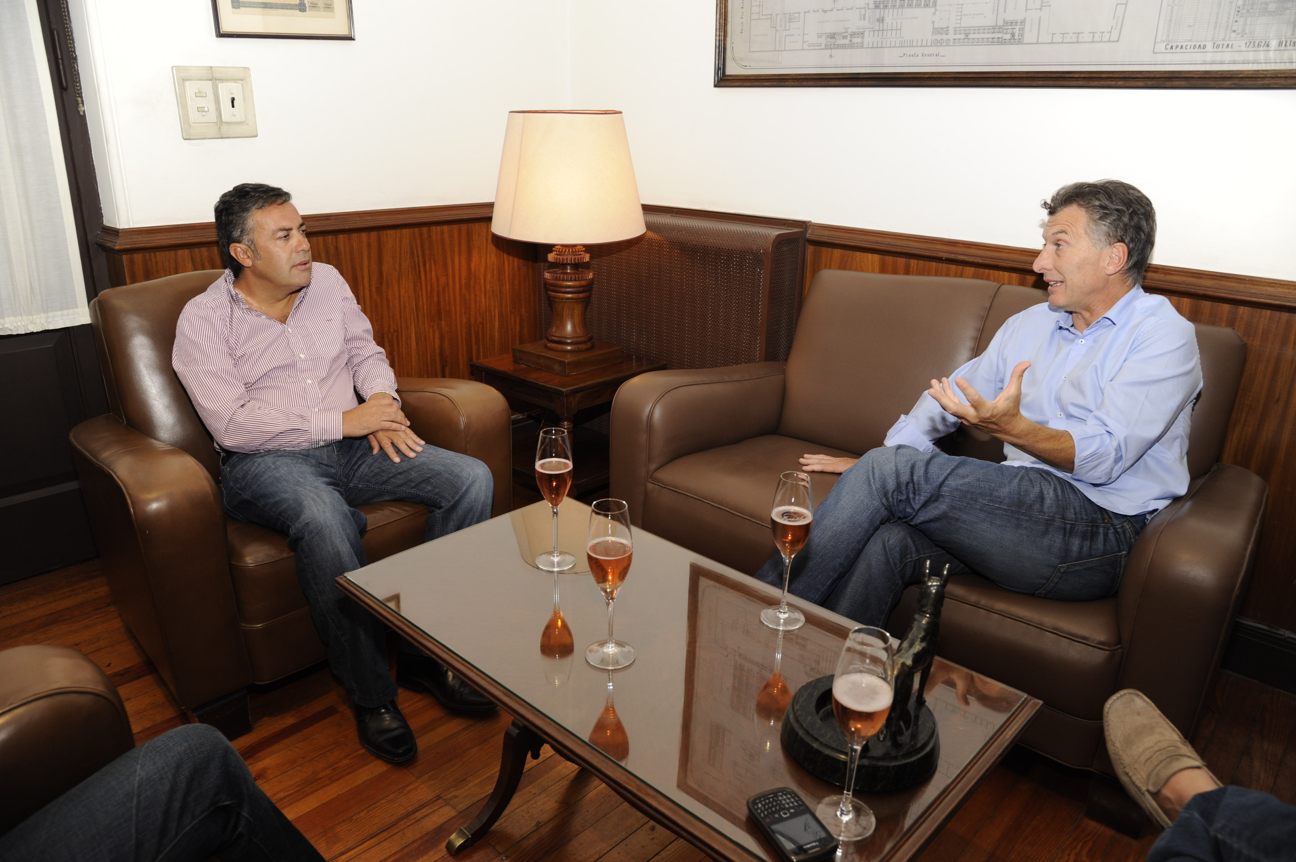 Godoy Cruz- Mendoza - Domingo 29 de enero de 2012 - El jefe de Gobierno de la Ciudad de Buenos Aires, Mauricio Macri, firmò esta tarde un acuerdo bilateral con el intendente de Godoy Cruz, Mendoza, Alfredo Cornejo. foto: GCBA/Prensa